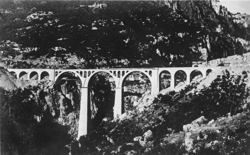 Türkei, Bagdadbahn Türkei, Bagdadbahn, Giaurdere-Viadukt im Taurus Gebirge, gebaut von Philipp Holzmann A.G. Information added by Wikimedia users.